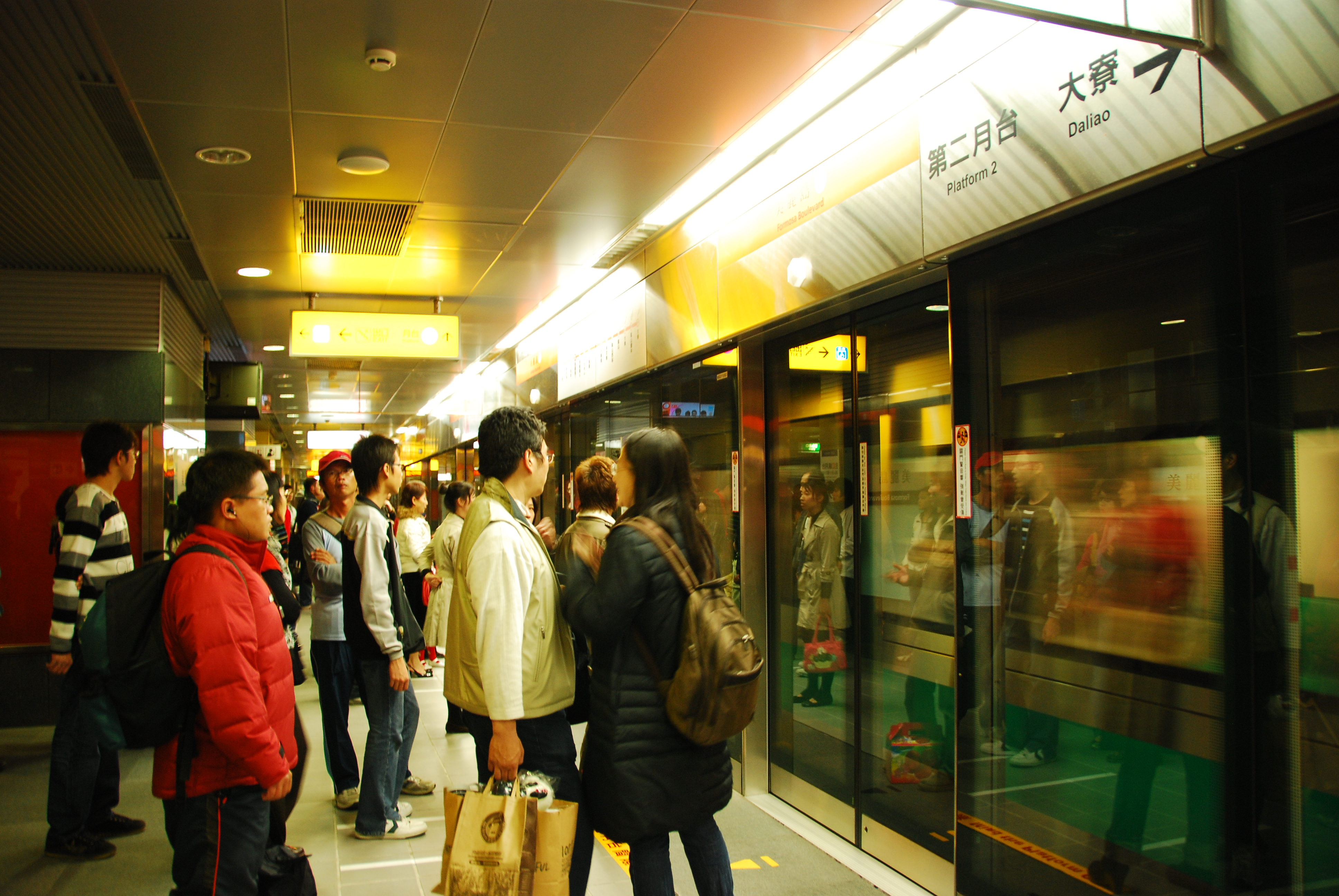 中文（台灣）: 高雄捷運美麗島站橘線月台層